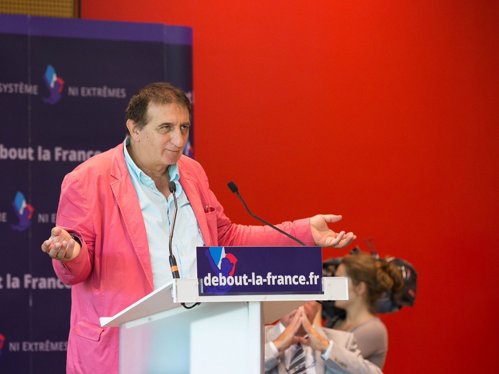 Jean-Paul Brighelli aux universités d'été de Debout la France en août 2015